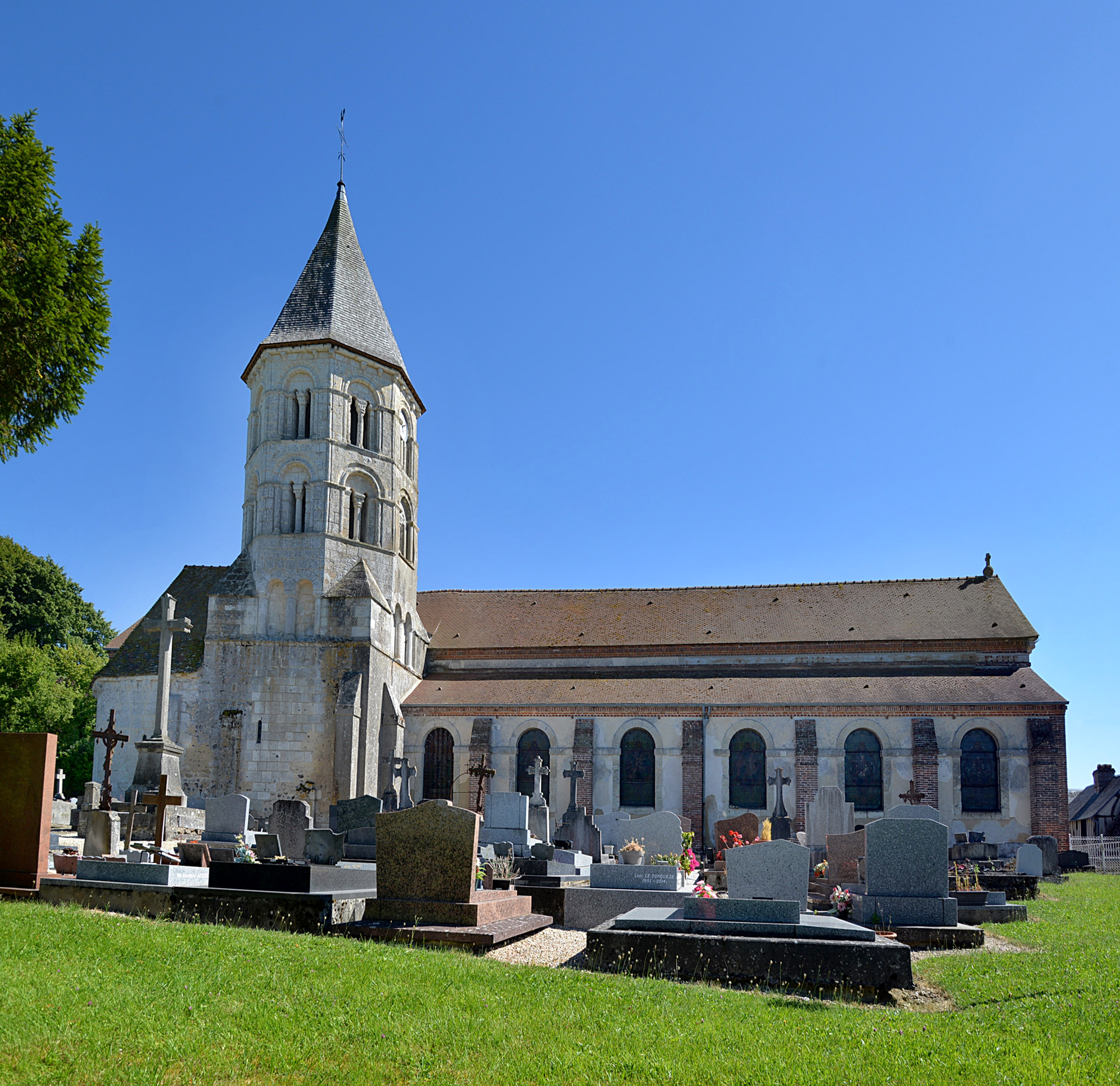 Tordouet (Valorbiquet - Calvados)